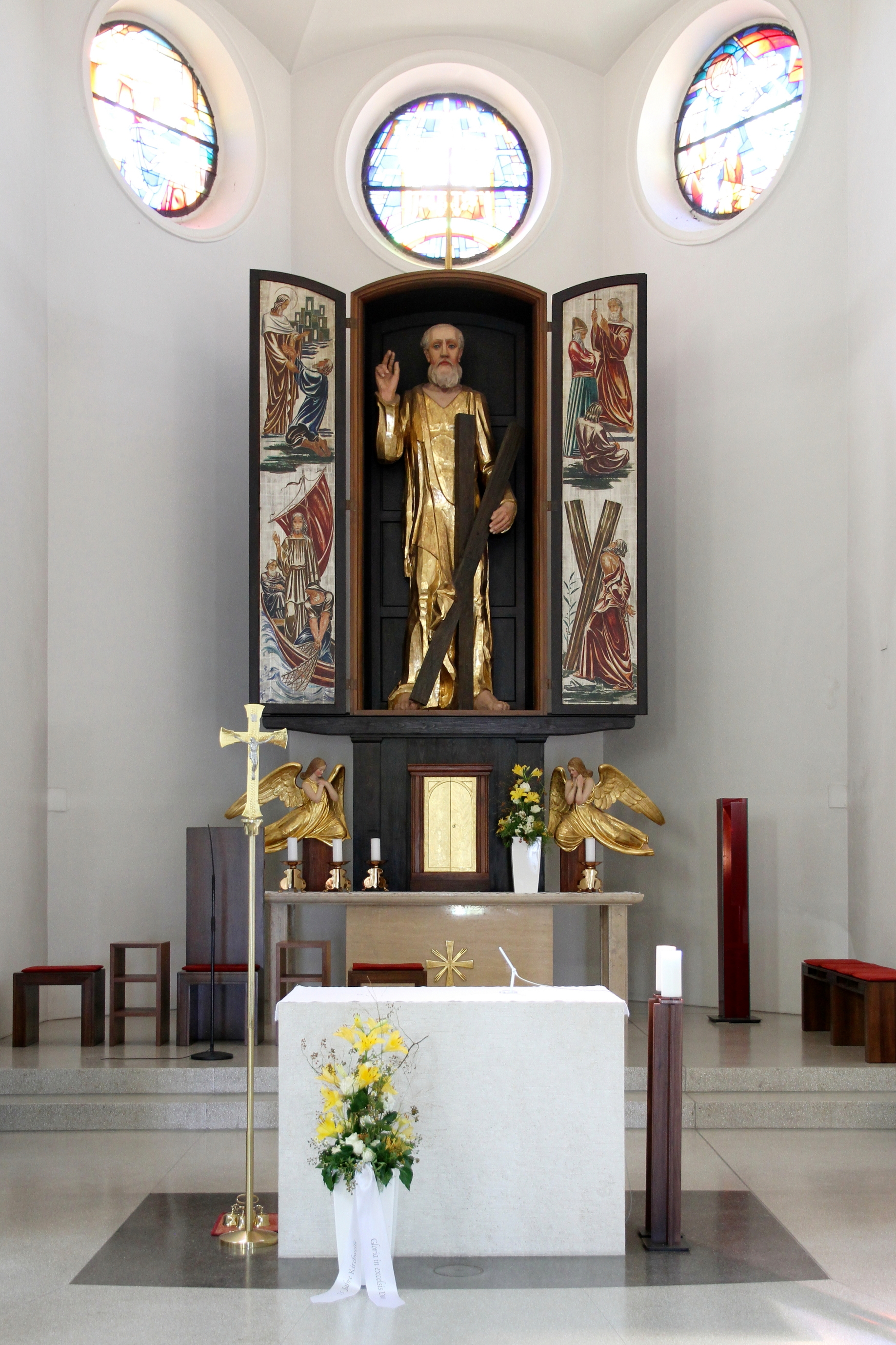 Hochaltar der katholischen Pfarrkirche hl. Andreas in der burgenländischen Gemeinde Sankt Andrä am Zicksee. Der Flügelaltar ist ein Werk von Wilhelm Bormann aus dem Jahr 1937.